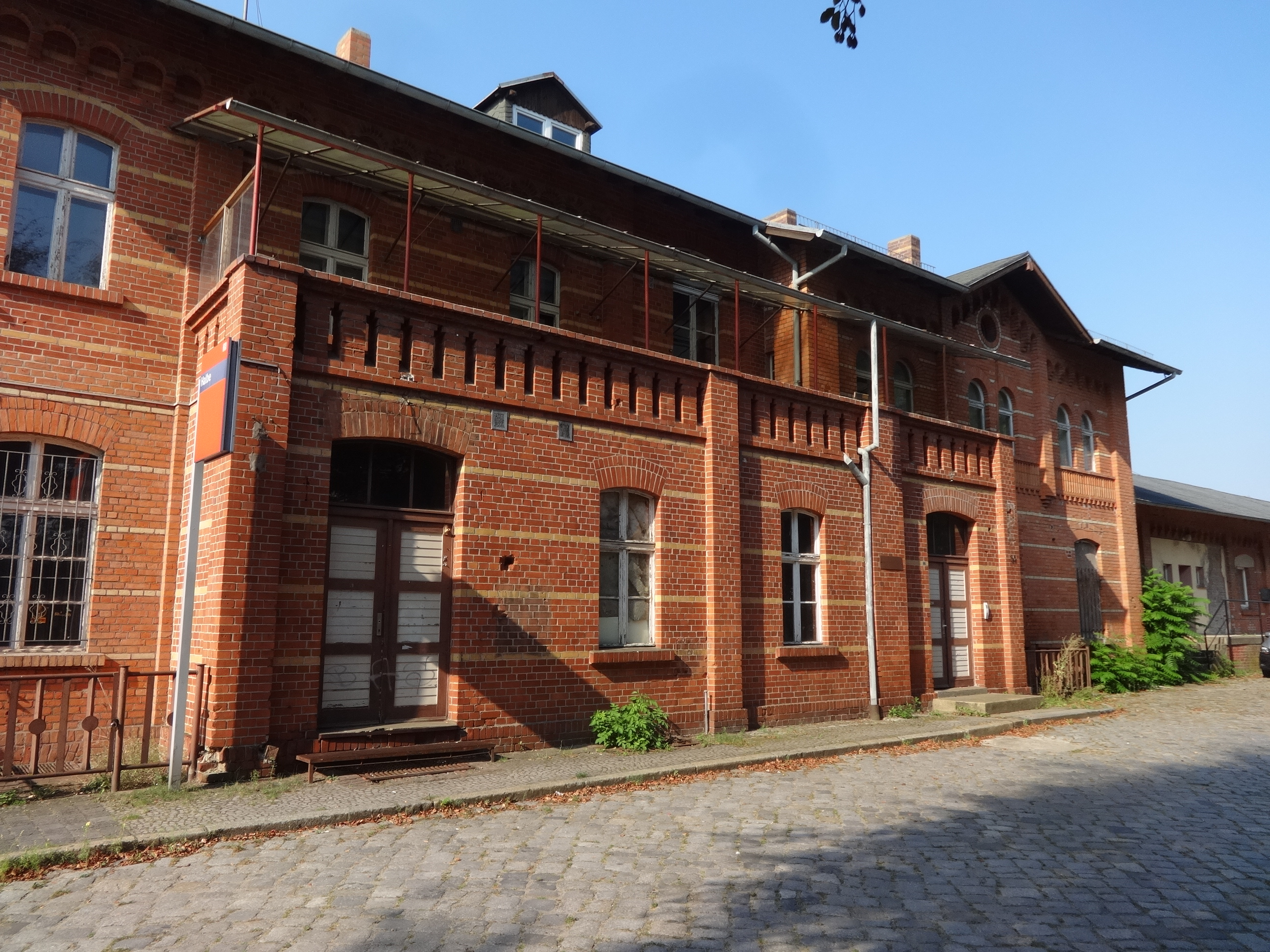 Bahnhofsgebäude und Anbau in Halbe, Brandenburg